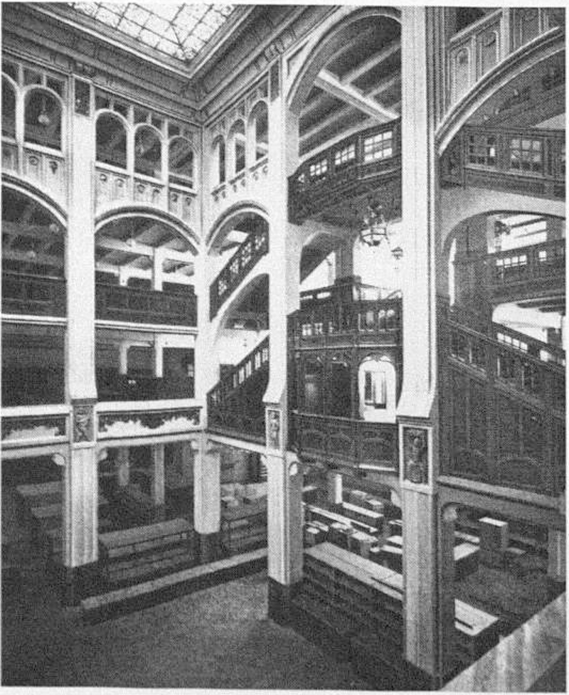 Der Lichthof des Kaufhaus Oberpollinger, München im Jahr 1905